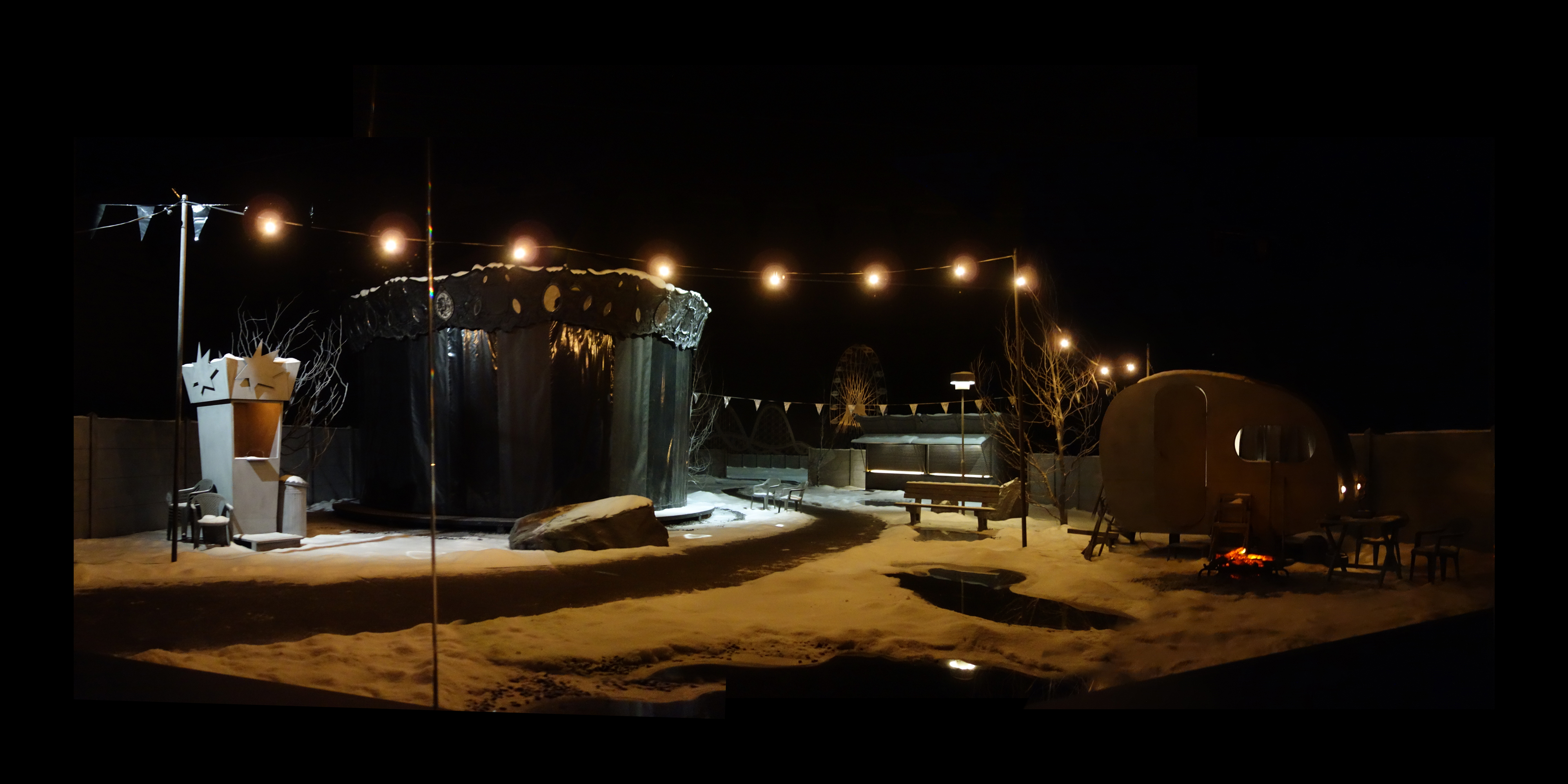 « Inviter cet artiste multi-disciplinaire à l’univers captivant, c’est affirmer une croyance dans la puissance narrative de l’art, sa capacité à susciter des récits et des émotions. » Info Les Champs Libres